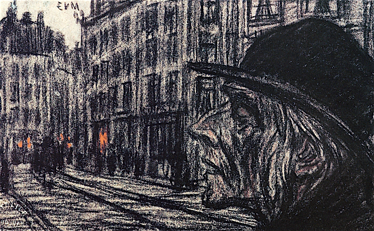 Belgian artist Eugeen van Mieghem (1875-1930). ================= Belgian artist Eugeen van Mieghem (1875-1930).